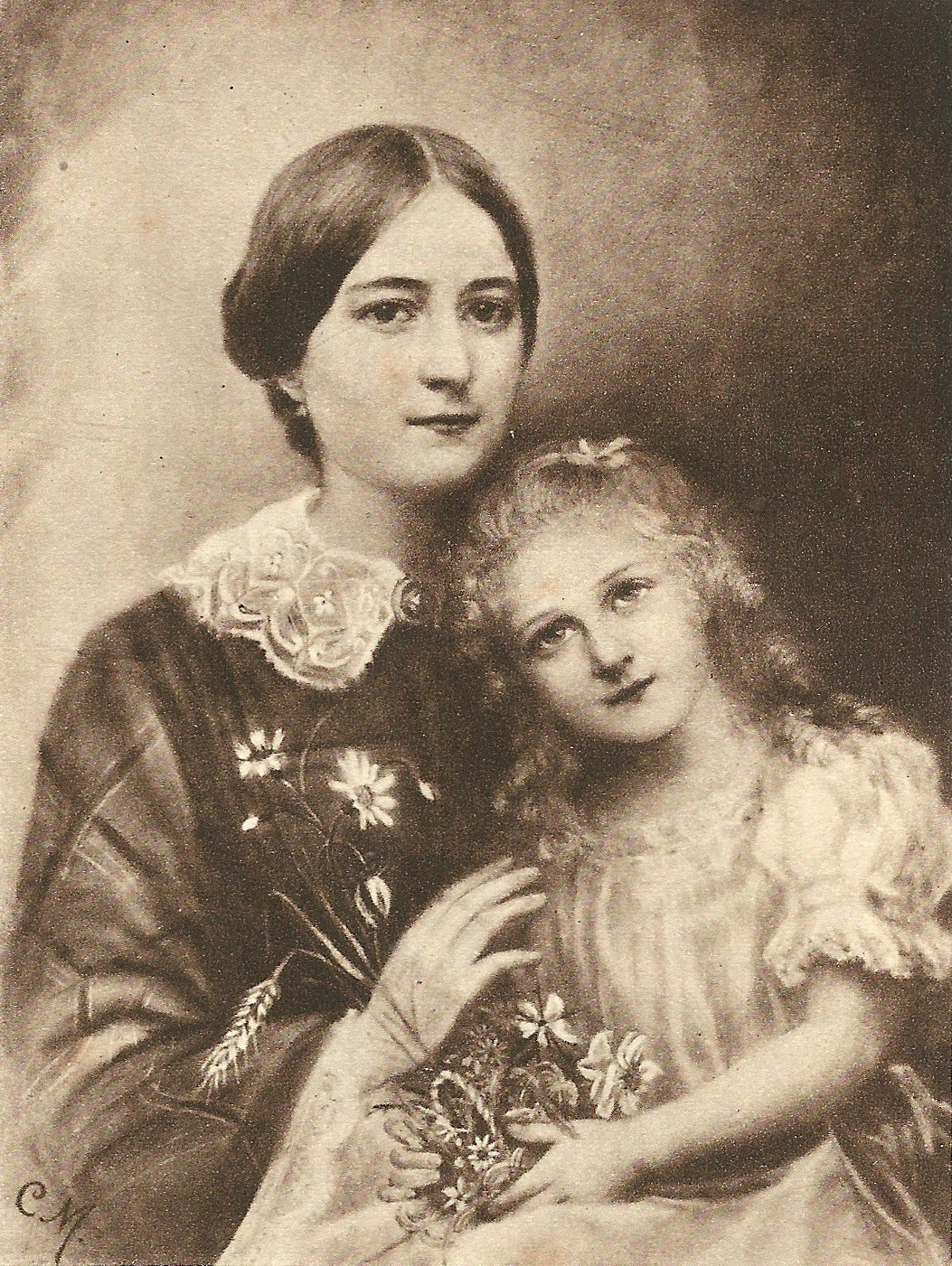 Gravure de Sainte Thérèse de l'Enfant Jésus, Histoire d'une âme écrite par elle-même, Lisieux, Office central de Lisieux (Calvados), & Bar-le-Duc, Imprimerie Saint-Paul, 1937, édition 1940. « Thérèse enfant et sa mère, d'après un dessin de Céline ».